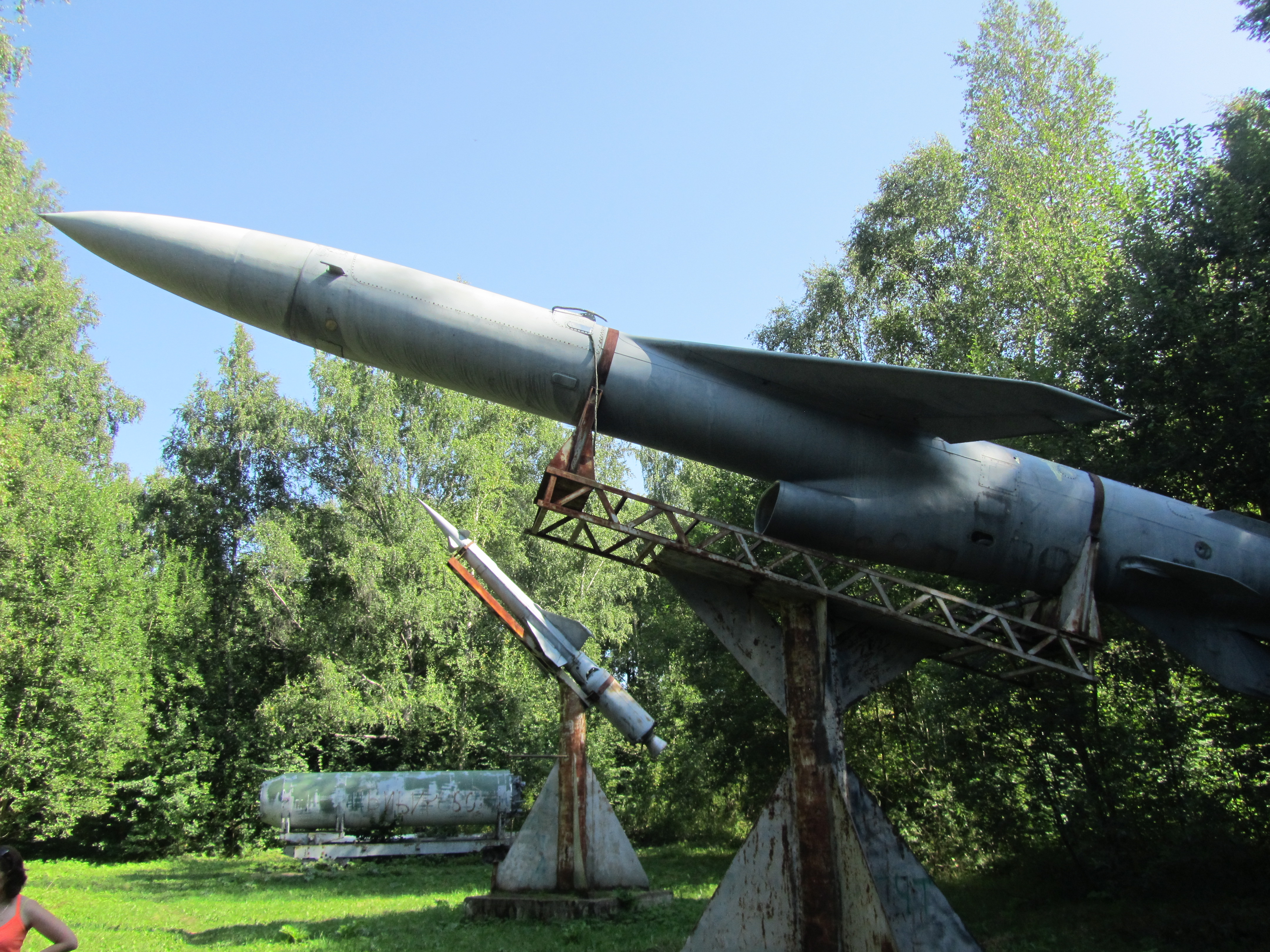 Ядрен батон и другое. Противокорабельная крылатая ракета П-5. Ракета 5В24 ЗРК С-125 «Нева». Ядерная баллистическая ракета подводных лодок Р-27. Музей "Ботик Петра I". Переславский р-н. Ярославская обл. Август 2013